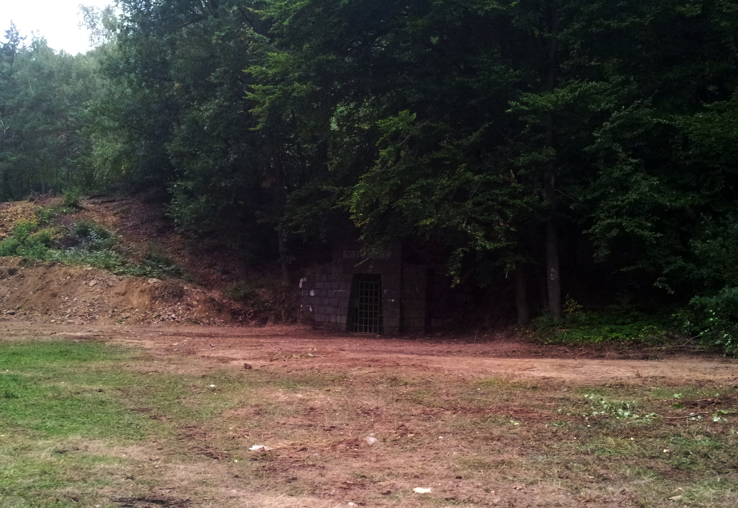 Vchod - štôlňa Jozef, bola upravená a vyzmáhaná v roku 2013. Plocha pred štôlňou Jozef je upravená a pripravená na ďalšie práce.